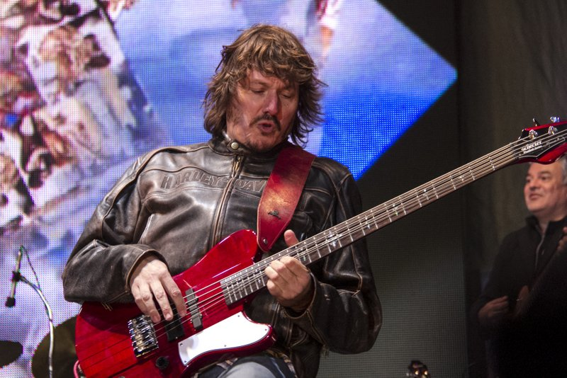 Javier Malosetti en 2014.